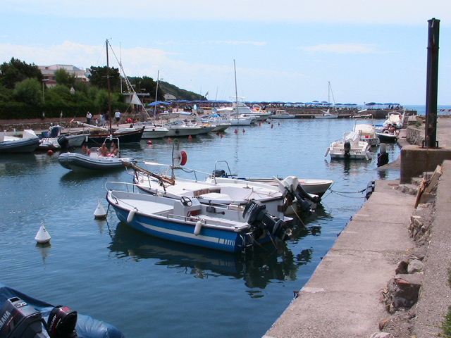 Quercianella (Livorno), near Porto del Chioma (Rosignano Marittimo)